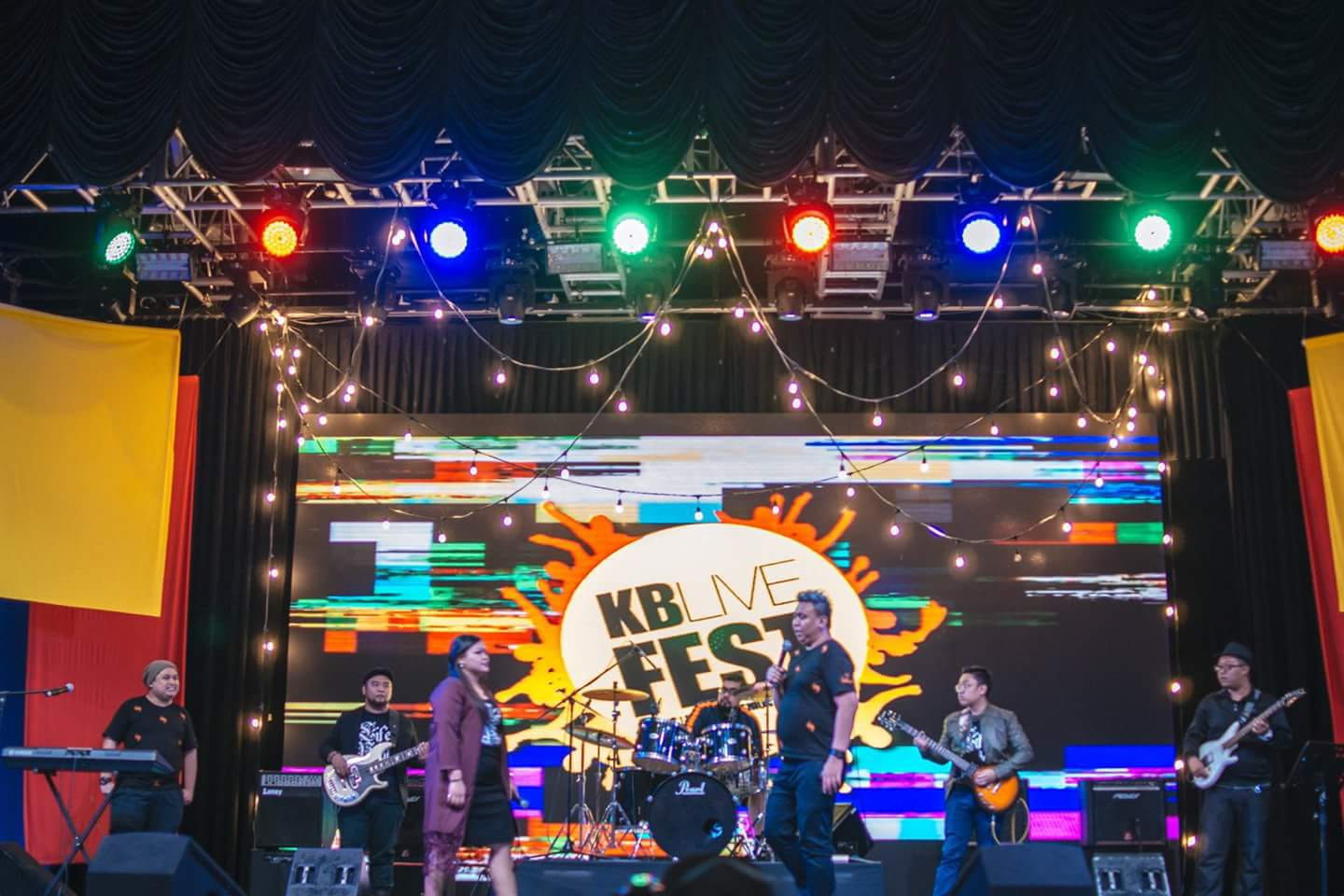 Life Petal di Pesta KB Malam